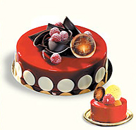 entremet patissier